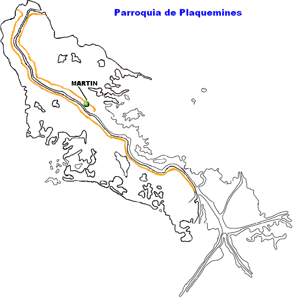 Martin, Louisiana.